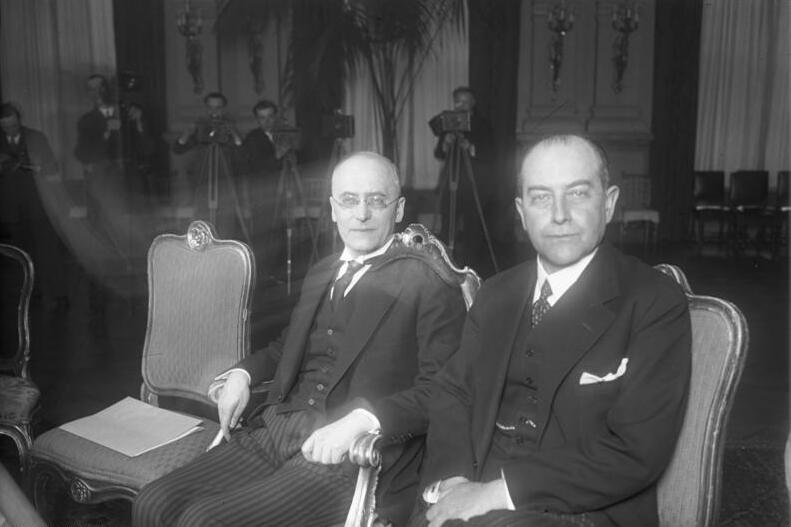 Reichskanzler Dr. Brüning und Reichsaussenminister Dr. Curtius nach England eingeladen! Reichskanzler Dr. Brüning (links) und Reichsaussenminister Dr. Curtius sind nach London zu freundschaftlichen Besprechungen eingeladen worden.